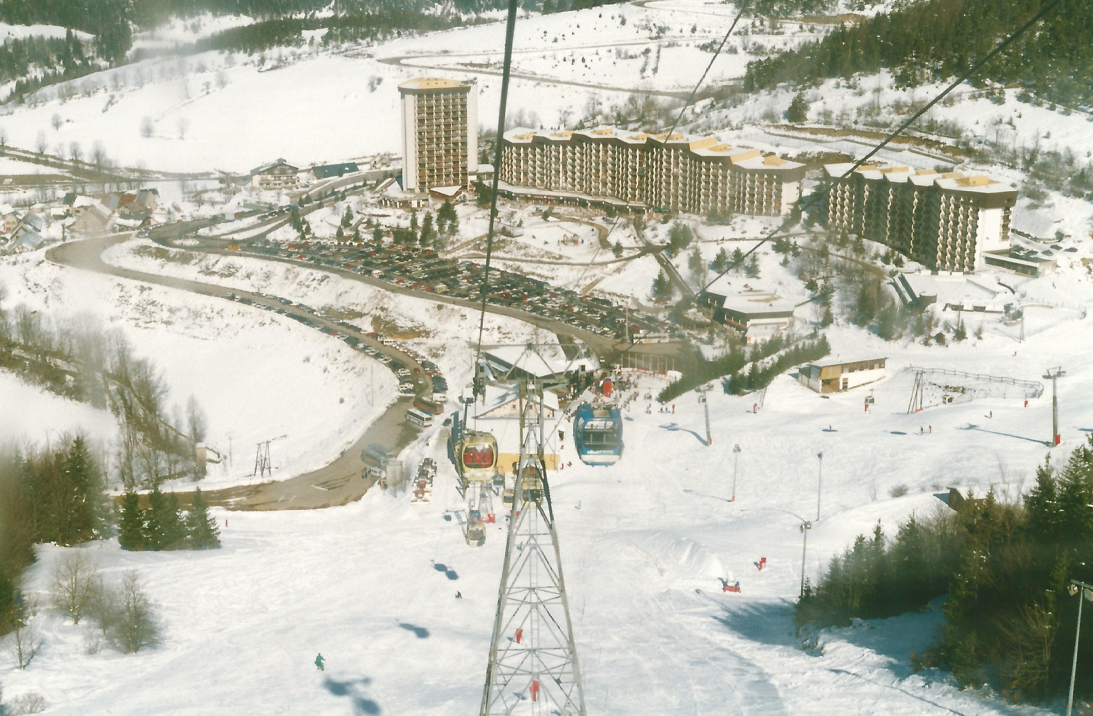 Vue des Gares Avales des Télécabines Côte 2000 et Prés des Prey avec en fond le Balcon de Villard de Lans ( Année 1998)